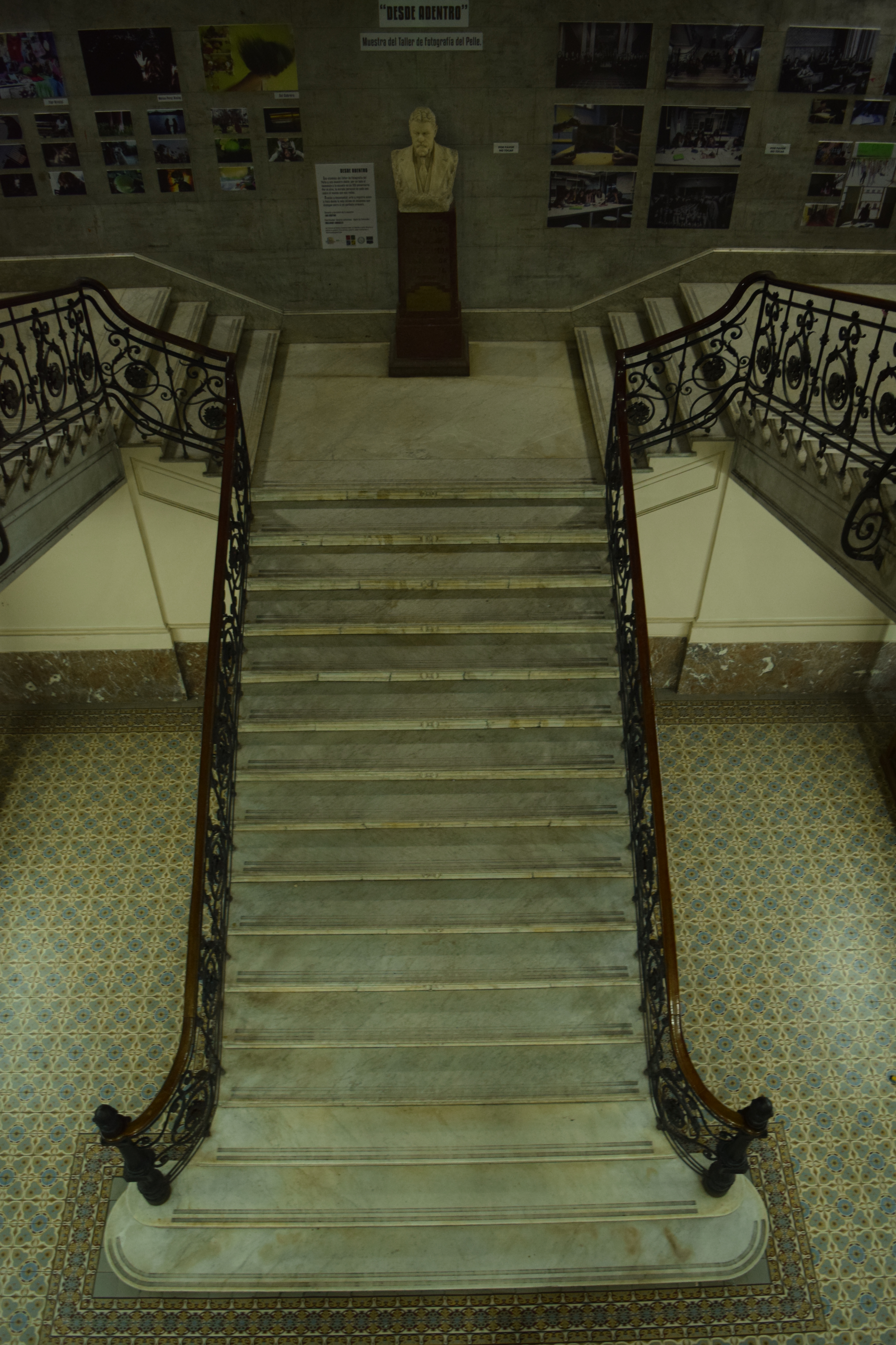 Escaleras del hall de la Escuela Superior de Comercio Carlos Pellegrini dependiente de la Universidad de Buenos Aires.